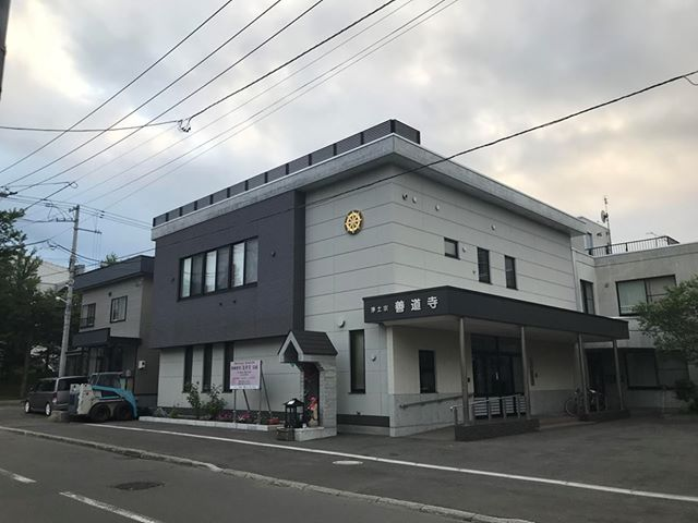 善道寺 前景 2018年7月18日撮影